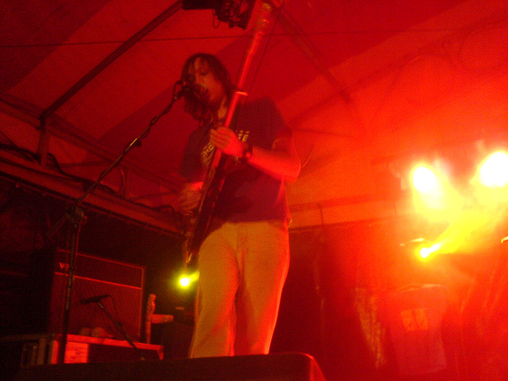 Dutch band Hospital Nijmegen at Nijmegen-Valkhof (20-7-2006)